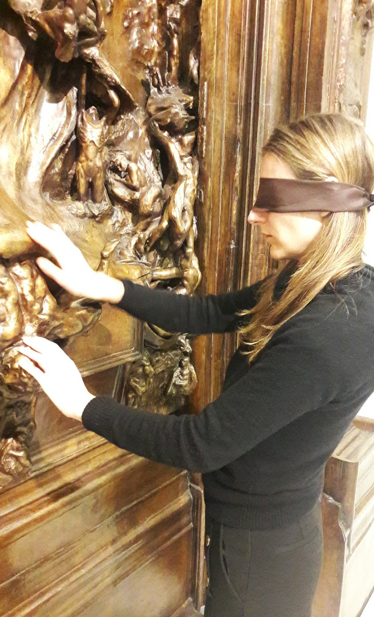 Visita Táctil Museo Soumaya RS